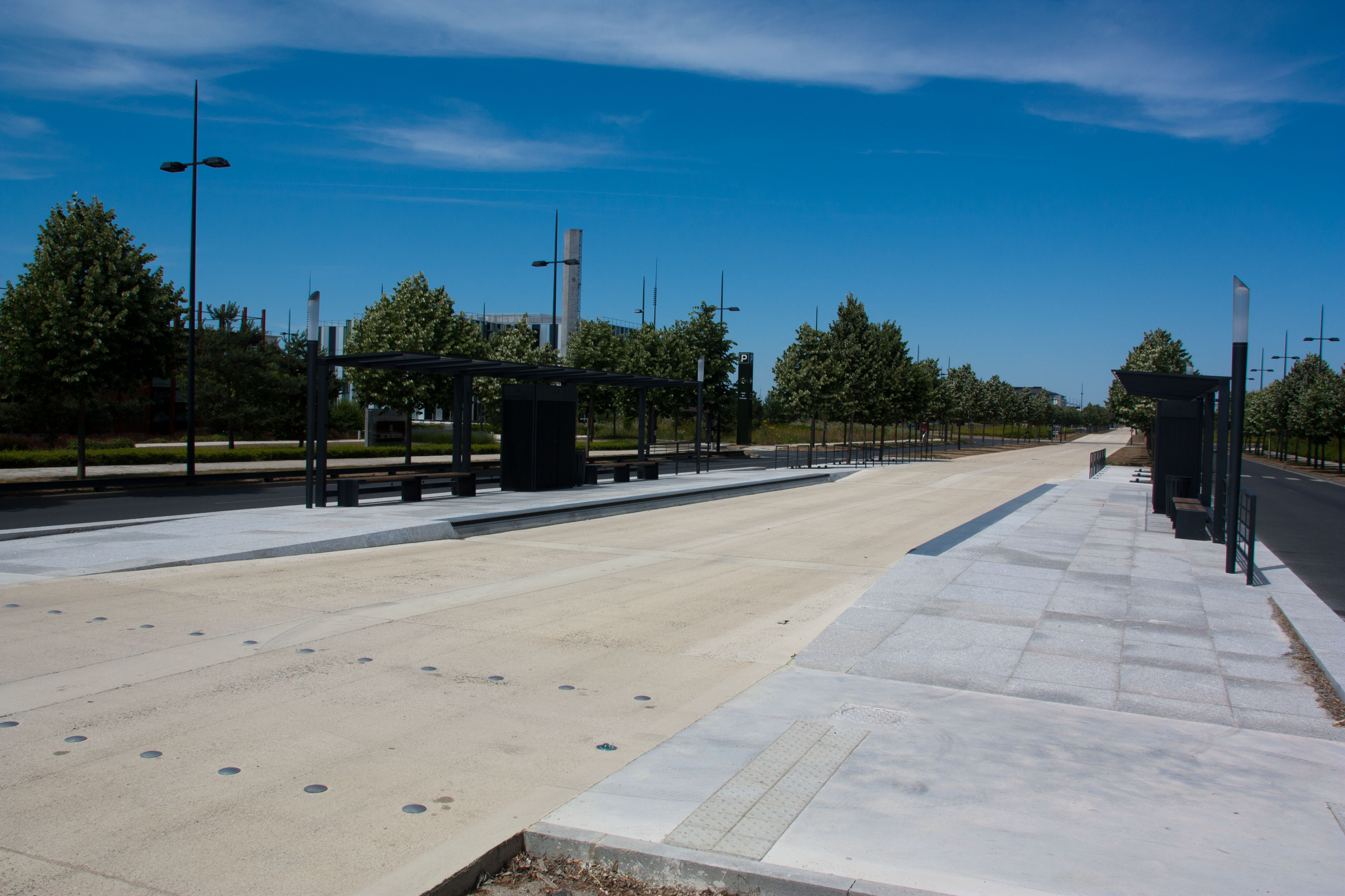 T-ZEN Ligne 1 - station de la ligne - Département de l'Essonne et de Seine-et-Marne